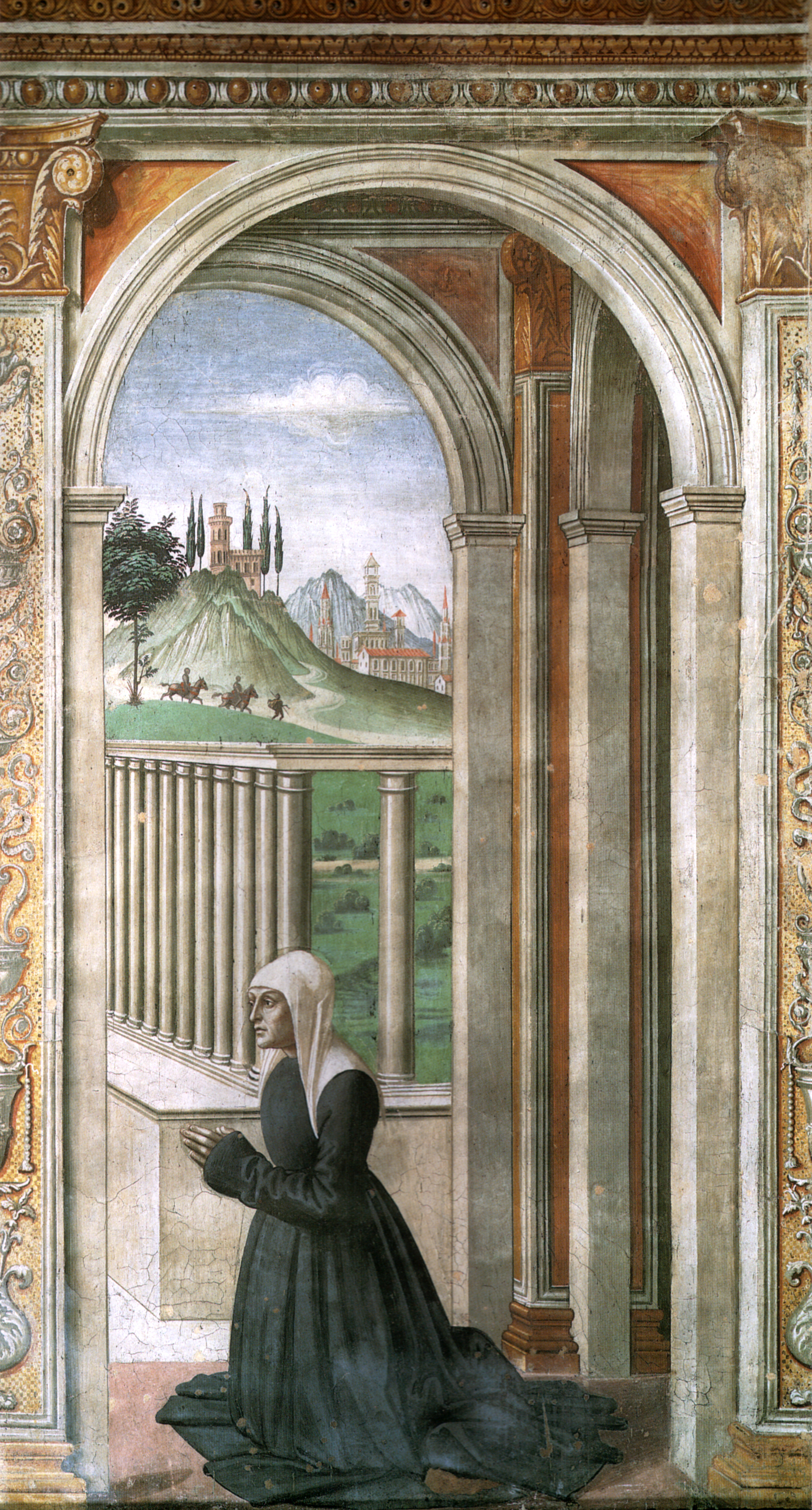 cappella tornabuoni frescoes in florence